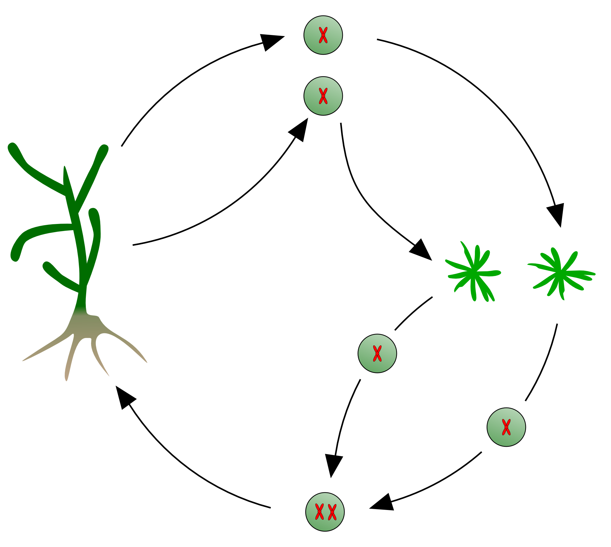 Kelp-Lebenszyklus